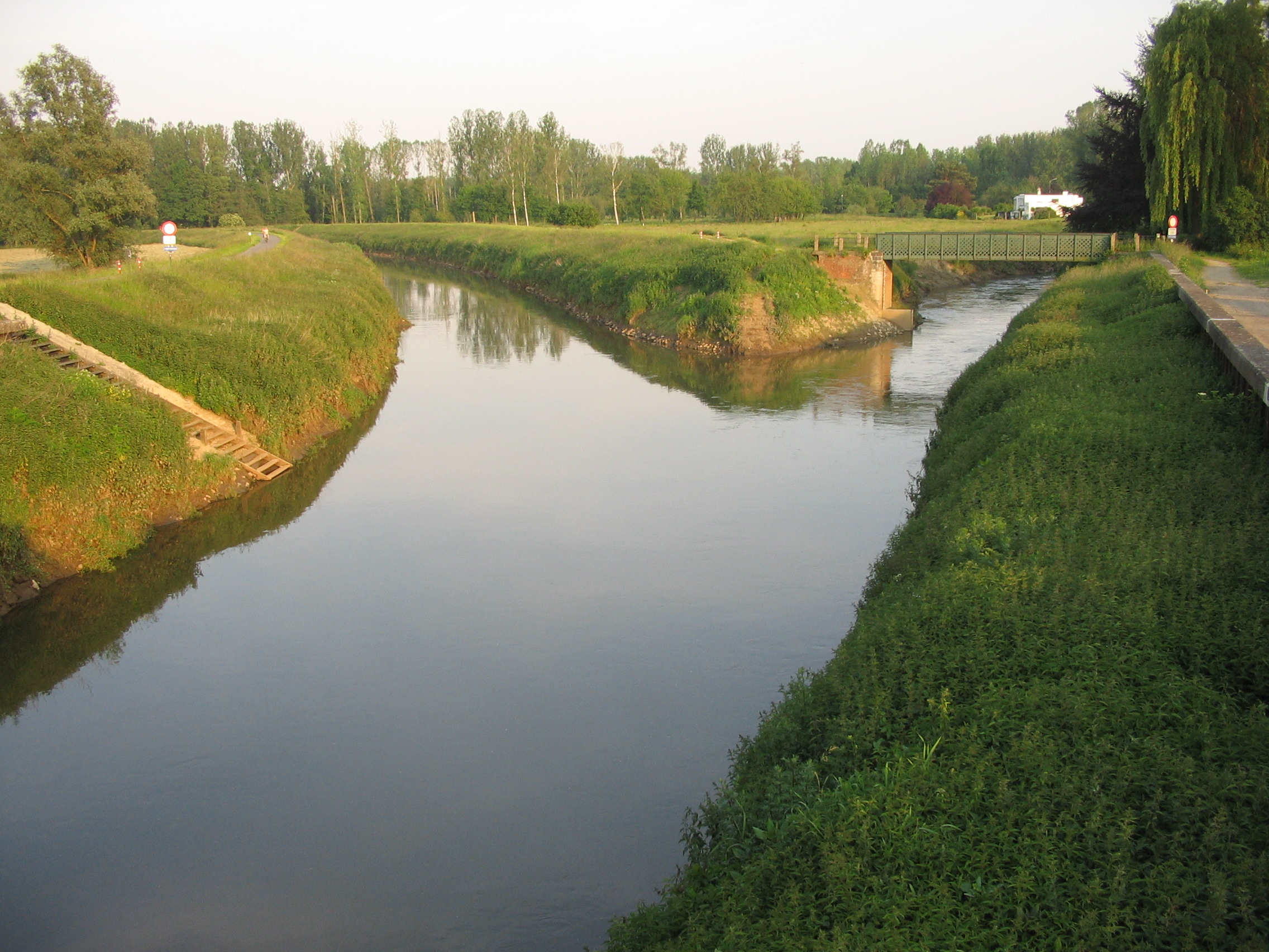 eigen foto ^samenvloeiing van de Demer en de Dijle te Werchter